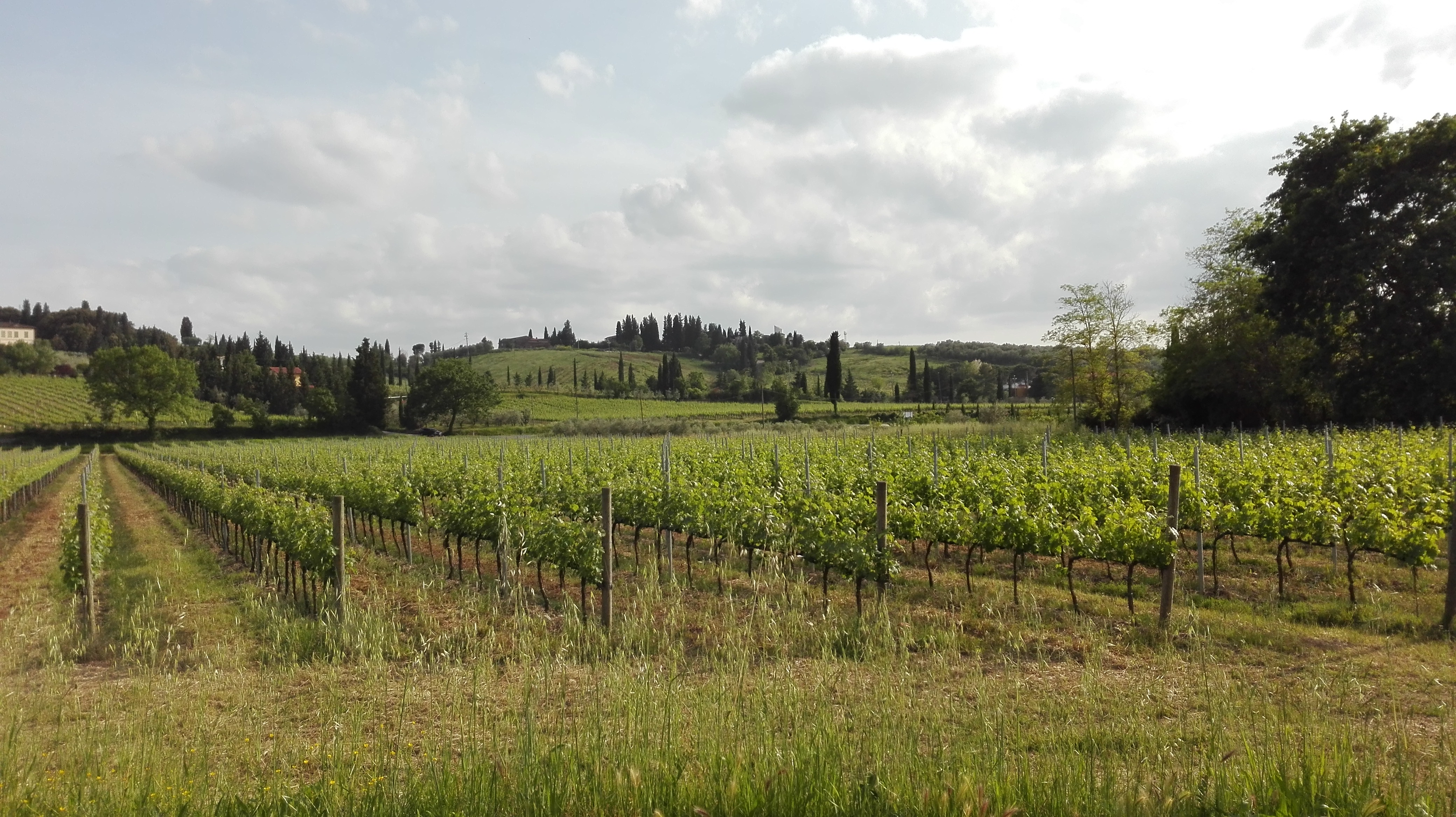 Empoli's countryside